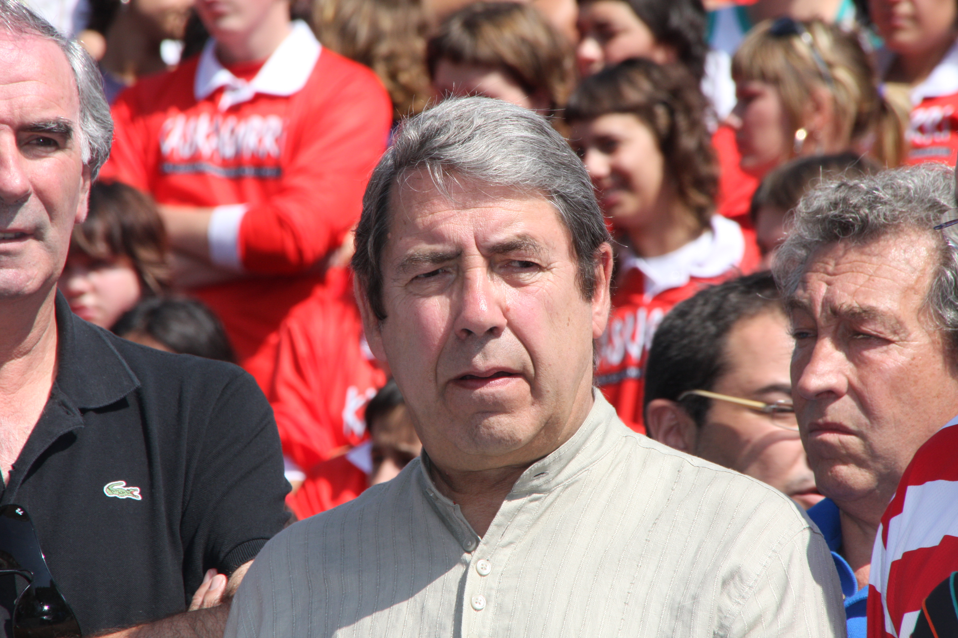 El ex presidente del Athletic de Bilbao, José María Arrate, en un acto de apoyo a Sonia Polo, comparsera y activista que había recibido amenazas tras ser elegida txupinera de la Semana Grande de Bilbao (España) de 2009.